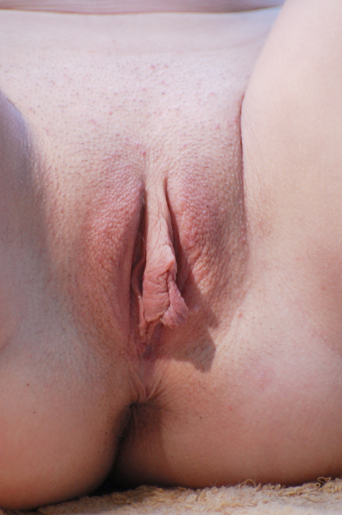 Vulva